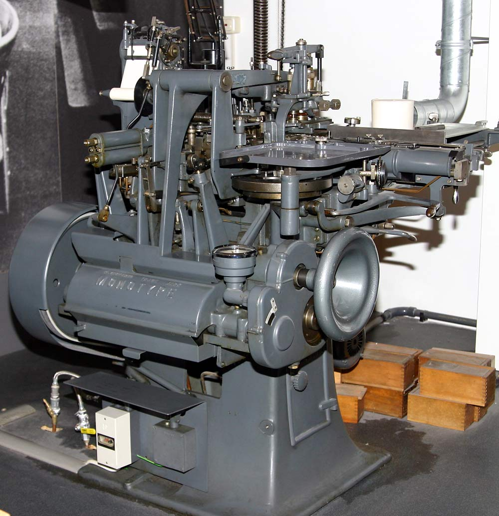 Monotype Giessmaschine fotografiert von: Softeis im Deutschen Museum GNU-FDL